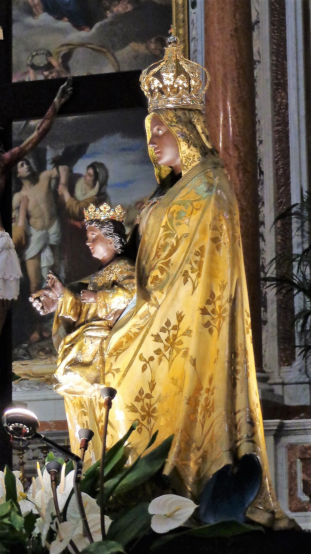 Icona raffigurante Maria Santissima del Tindari, opera di Matteo Trovato.